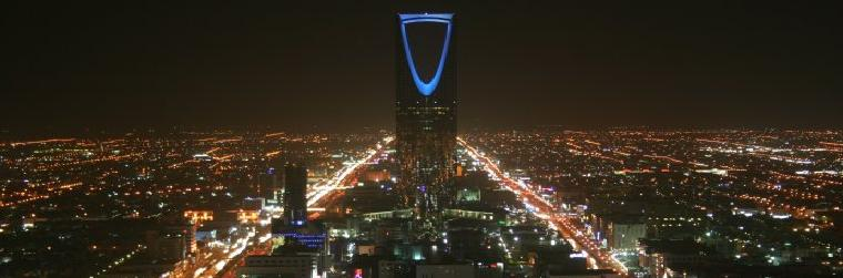 Riyadh Skyline